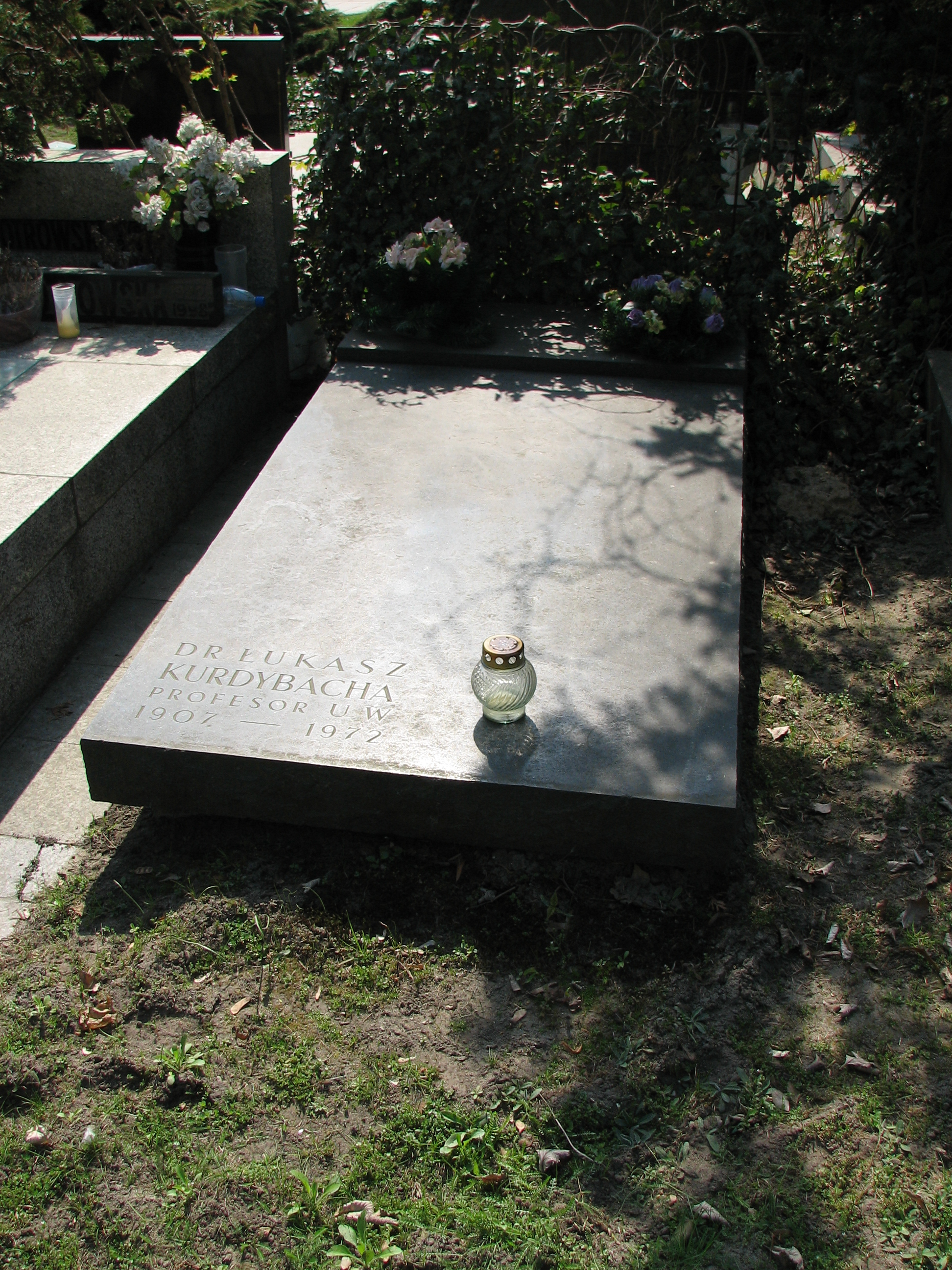 Łukasz Kurdybacha grób - Warszawa, Cmentarz Wojskowy na Powązkach